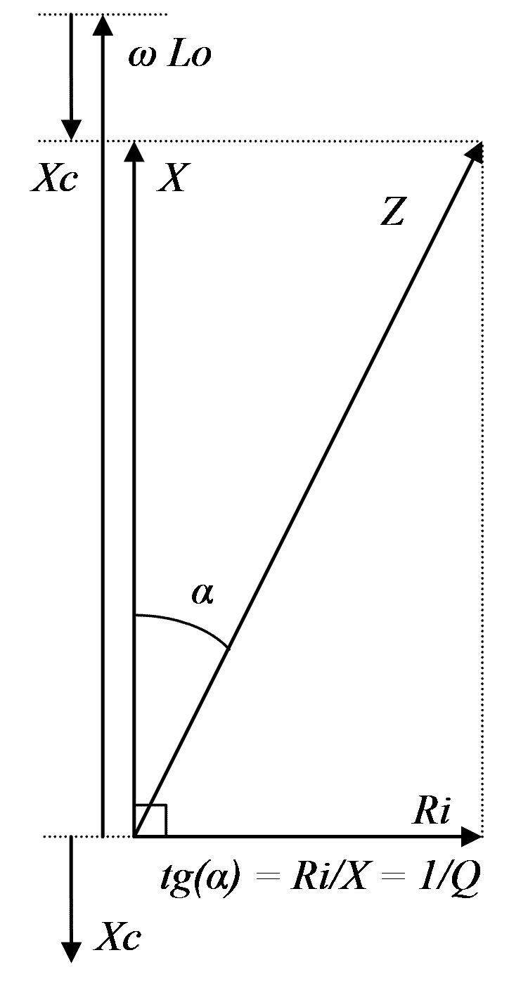 Phasor of Q-factor real inductor.gif